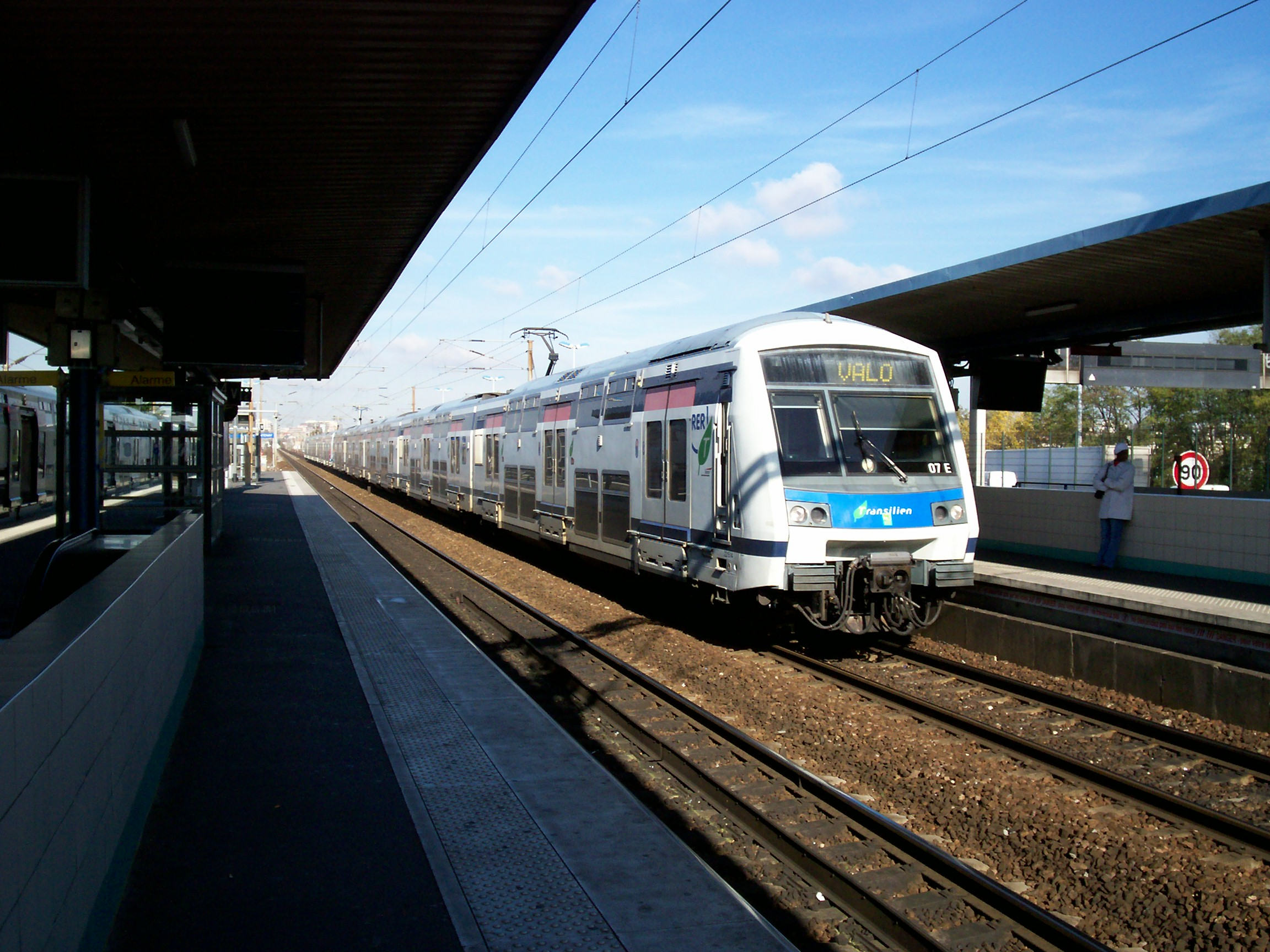 Rame Z22500 à Val de Fontenay mission VALO